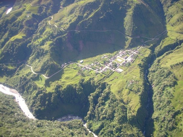 Vista aerea de Monopamba, donde se ubican el rio Sucio (abajo), y quebrada de Piedras (derecha)